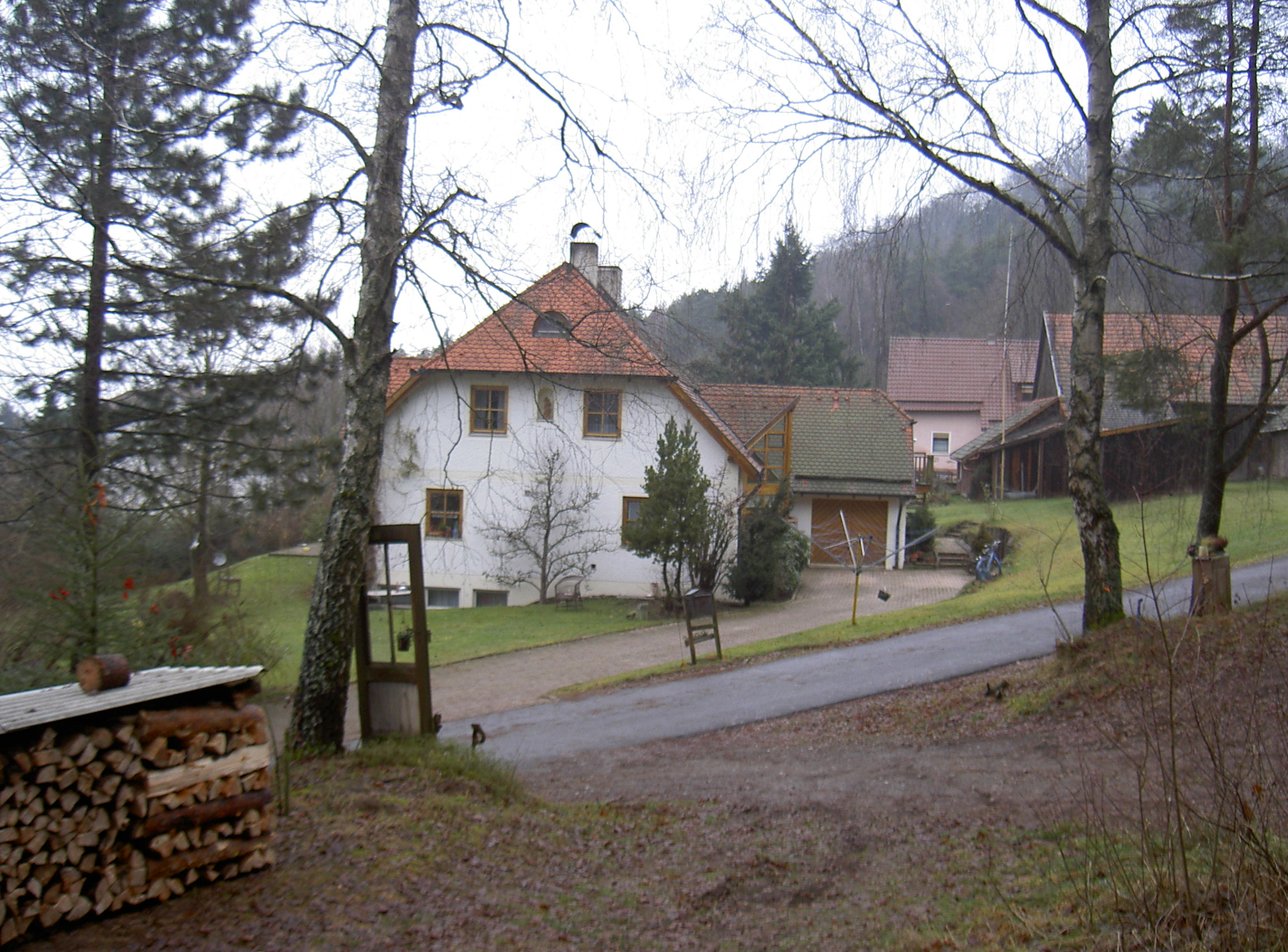 Warberg